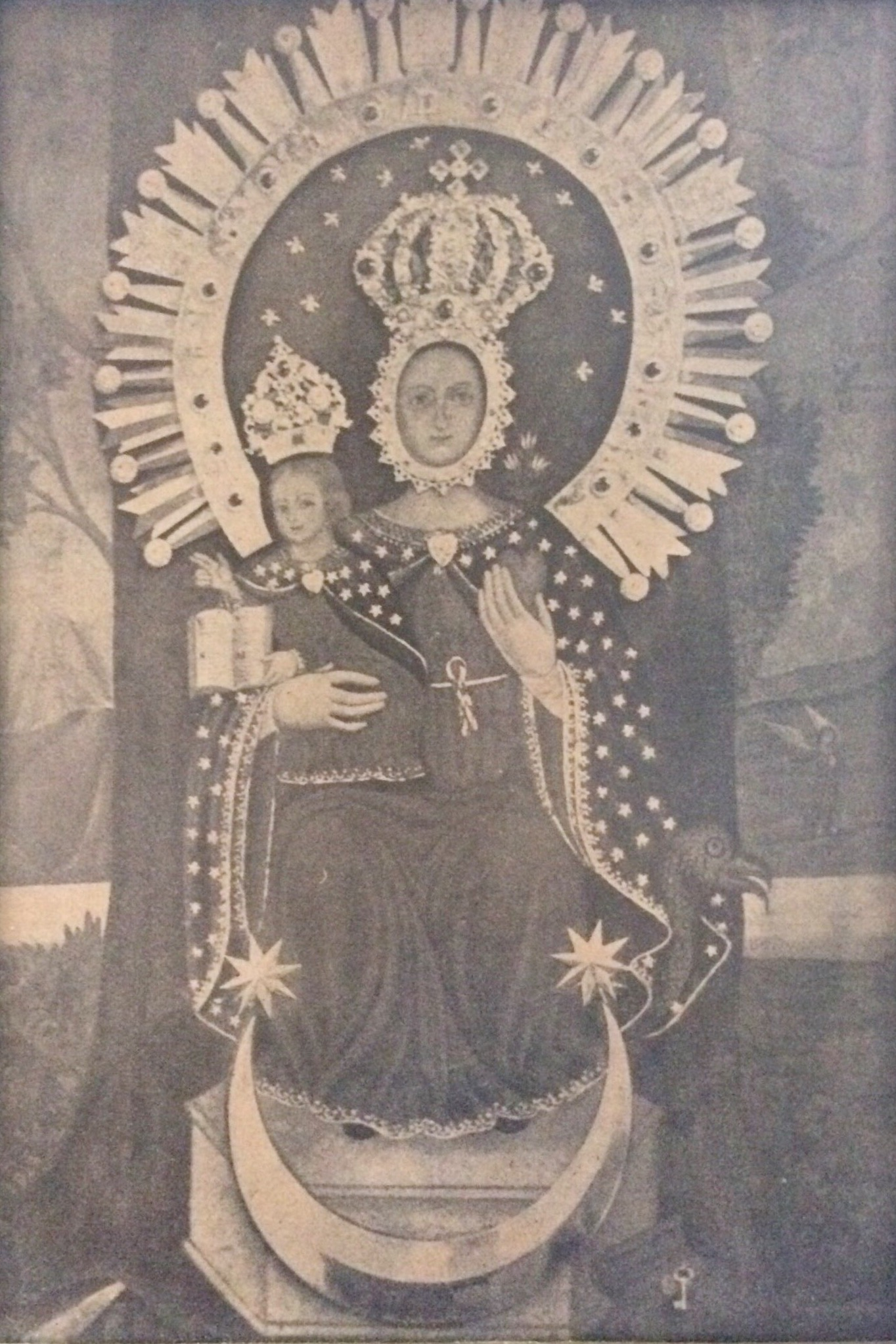 Cuadro de la Virgen de Valvanera venerado en Sonsón. Coronado canónicamente en 1954.